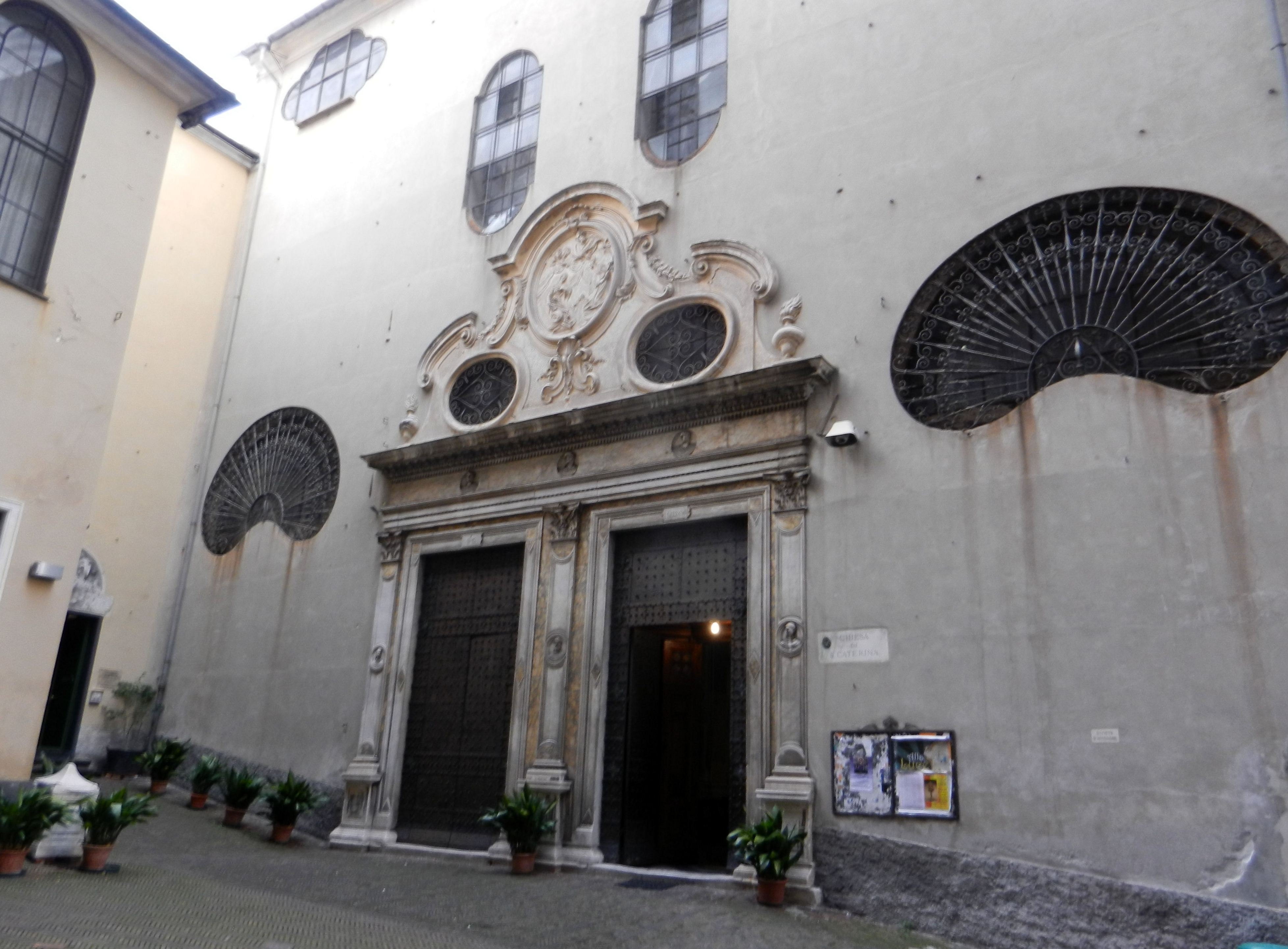 Genova, Chiesa della Santissima Annunziata di Portoria, portale d'ingresso